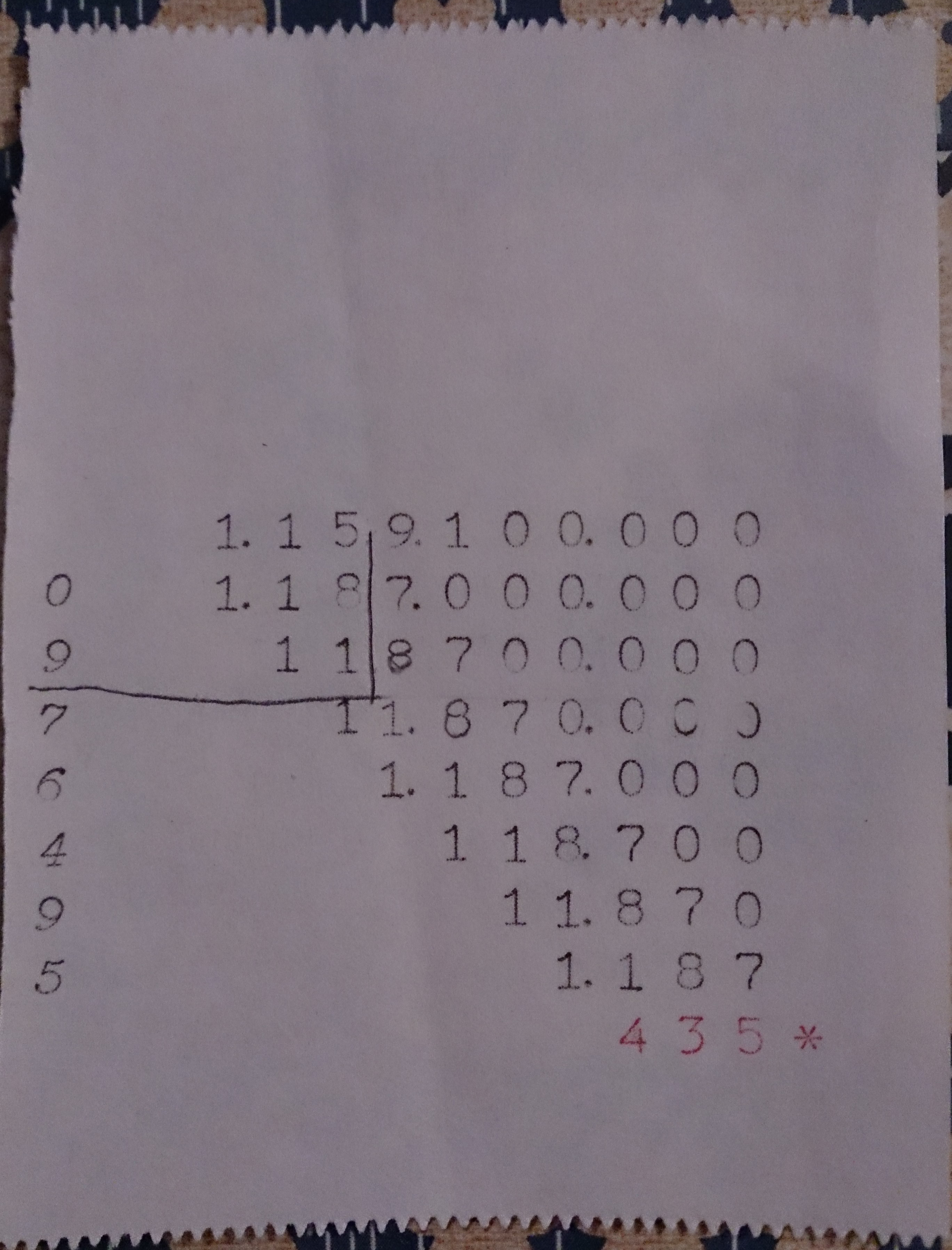 un esempio di stampa in divisione e determinazione della virgola con la divisumma 14 olivetti; foto mia